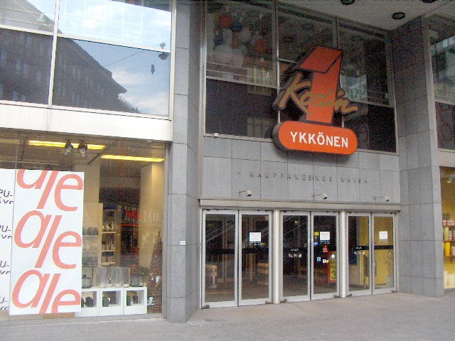 Kauppakeskus Kaisan Kaisaniemenkadun puoleinen sisäänkäynti kesällä 2006